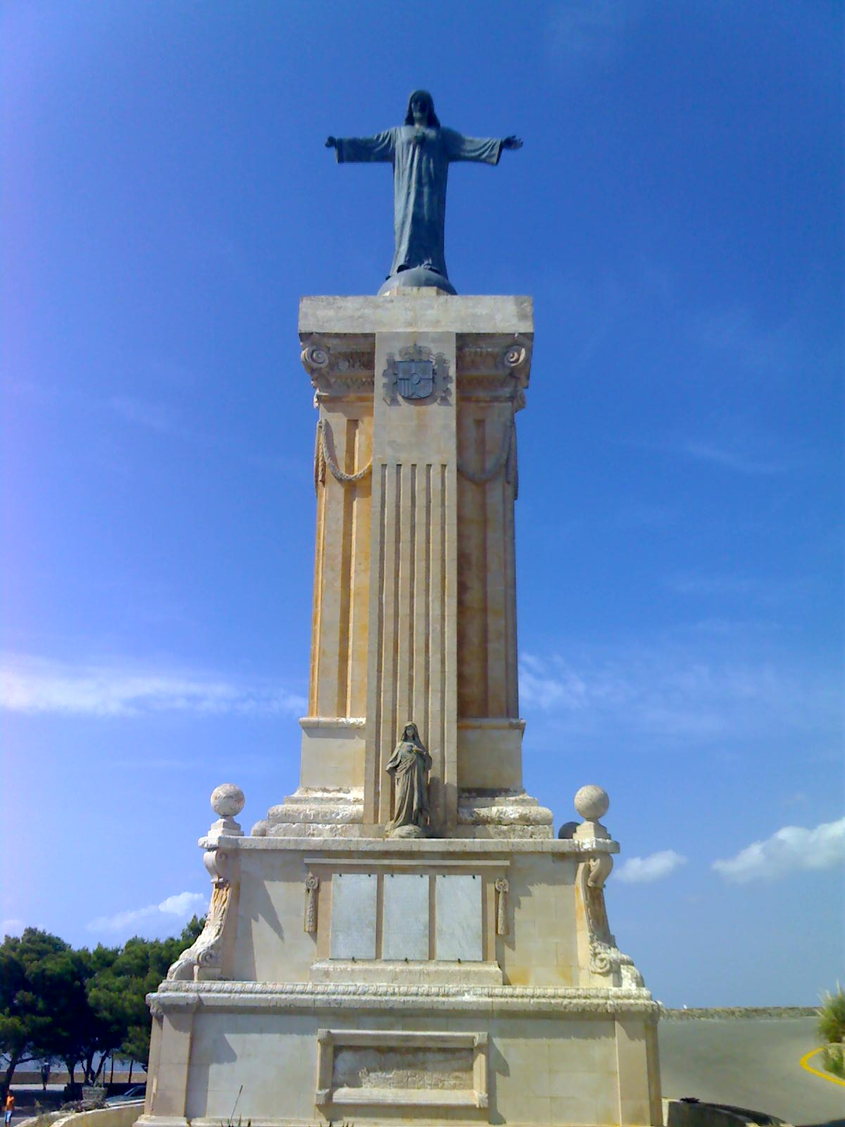 Socha Ježíše na vrchu El Torro, Menorca